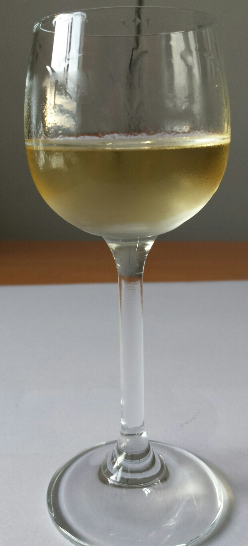 Vino dulce de Málaga